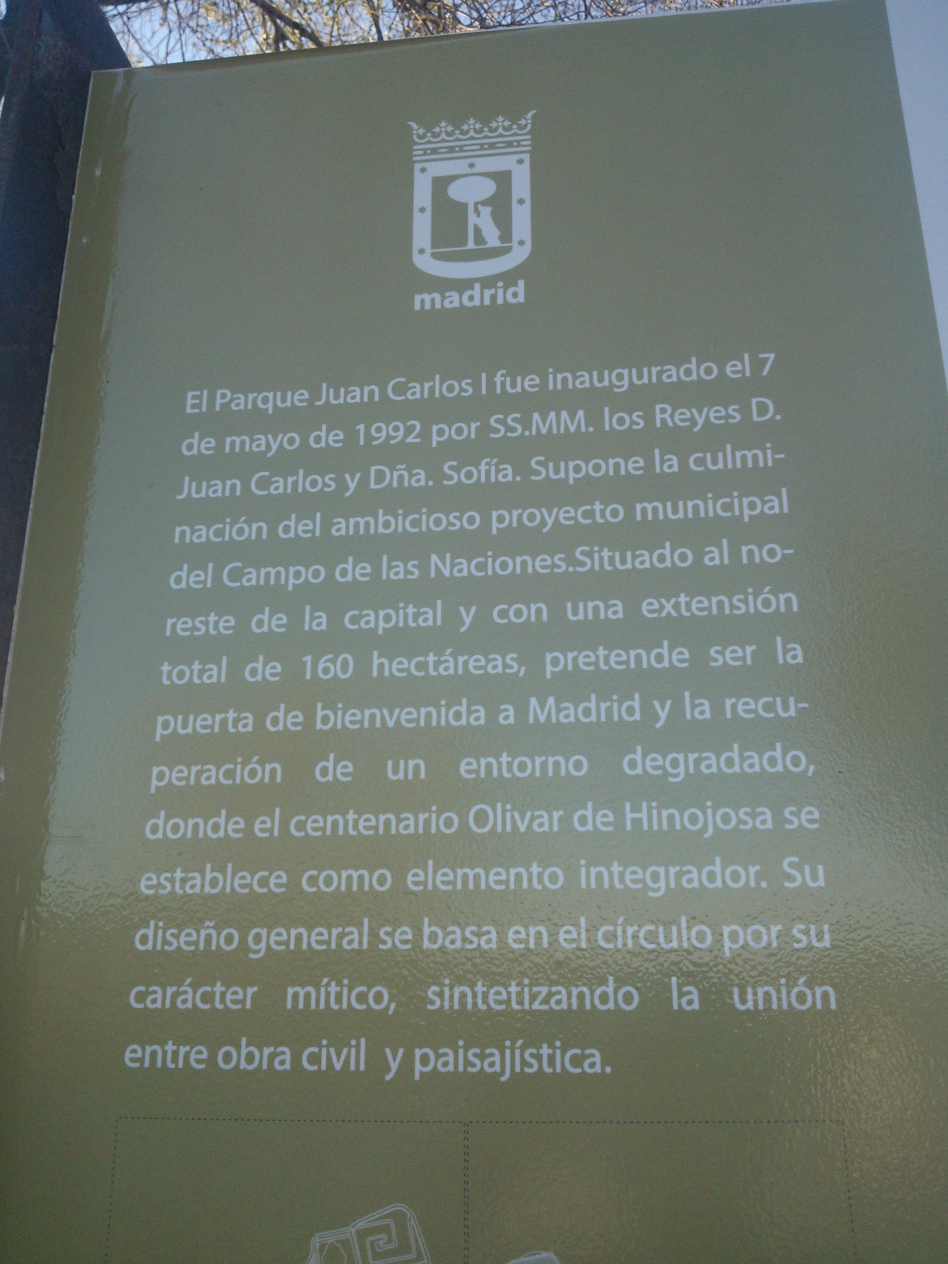 Panell explicatiu Parc Juan Carlos I de Madrid